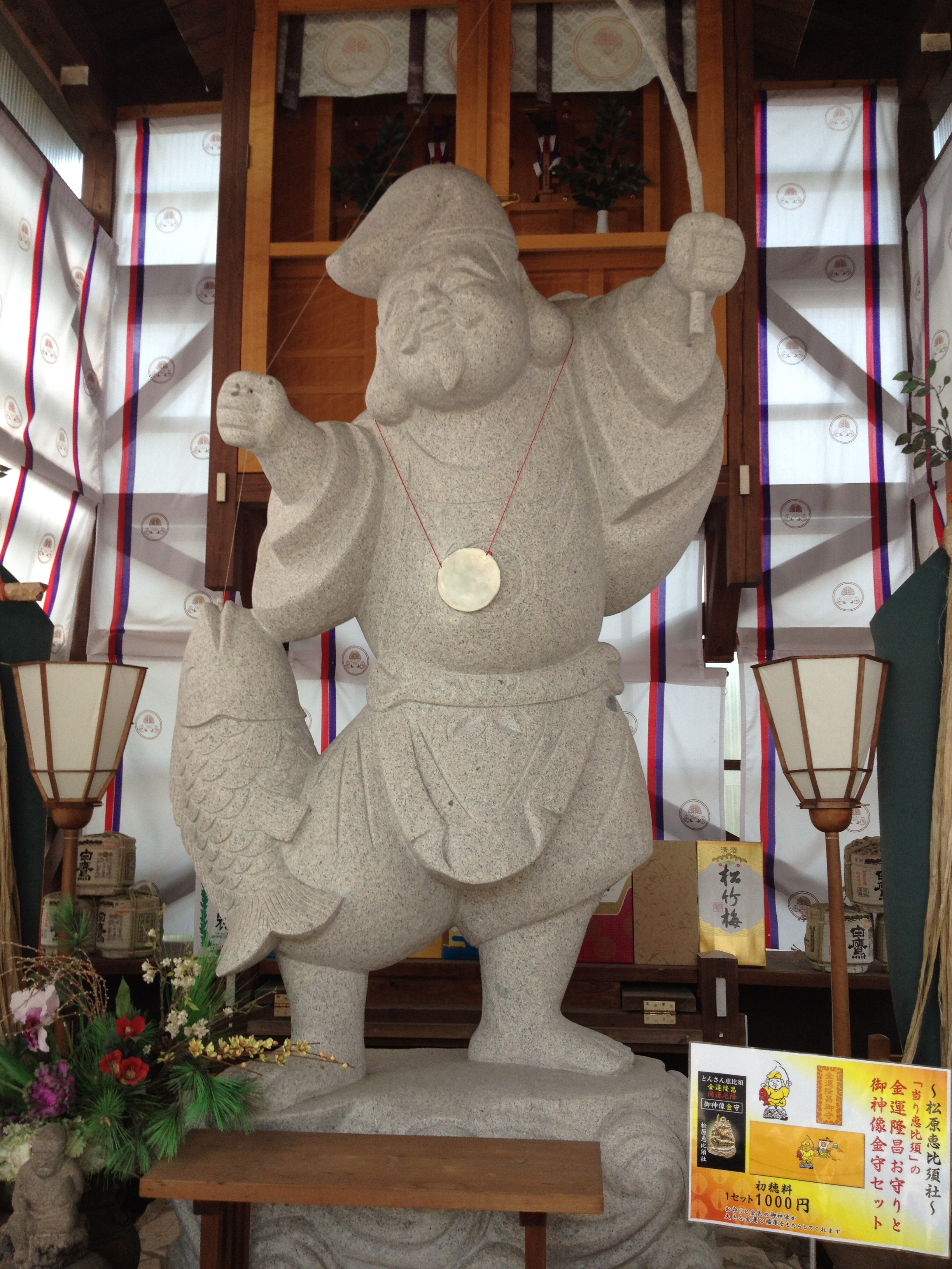 EBISU 31/88